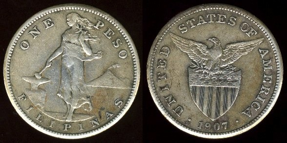 1 peso